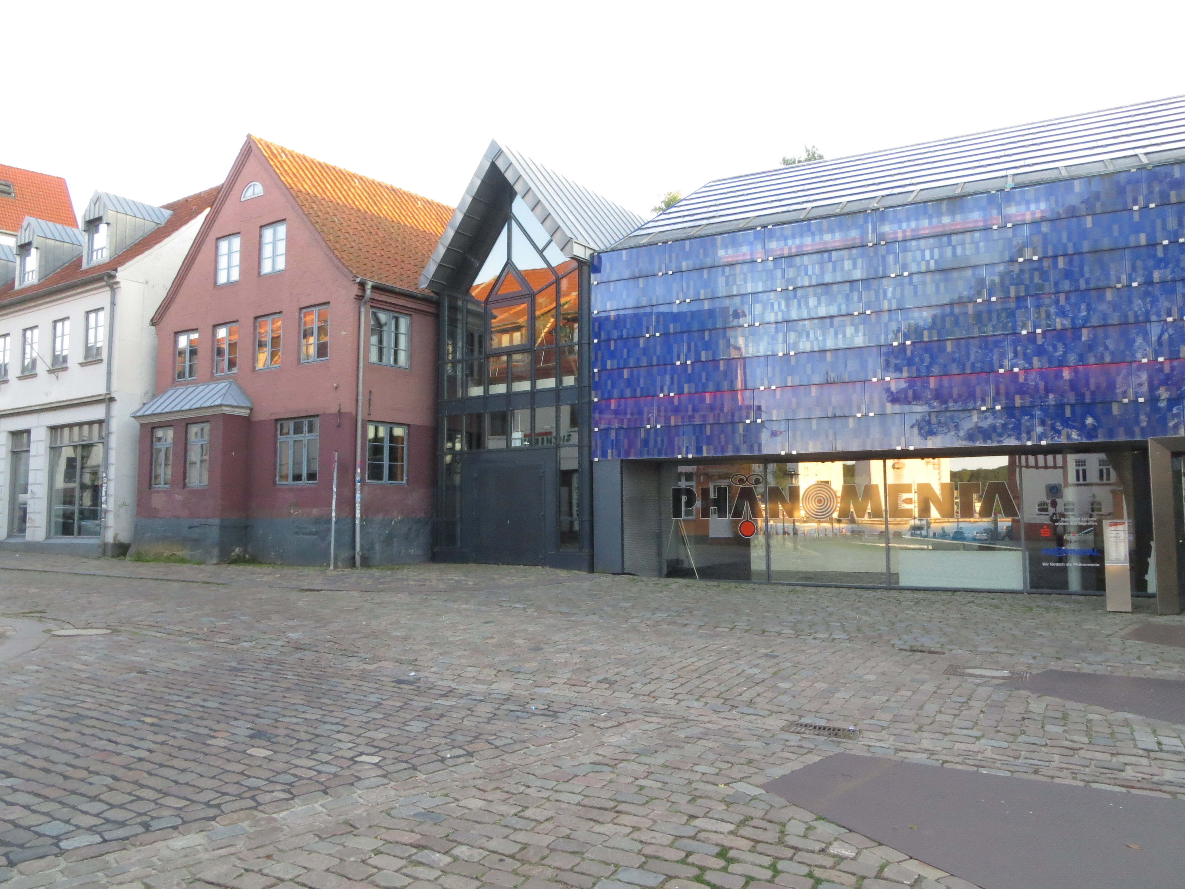 Die Phänomenta-Gebäude (Flensburg, 2013)